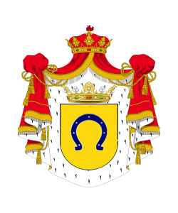 Armas de FERRANDELL sobre manto de GdE